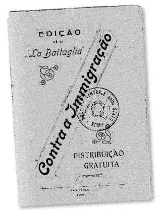 Edição da revista libertária La Battaglia editada por Oreste Ristori em 1906